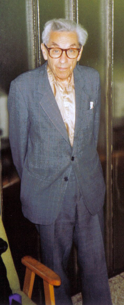 Paul Erdős at a student seminar in Budapest (fall 1992)